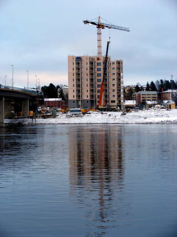 Joensuu Penttilä